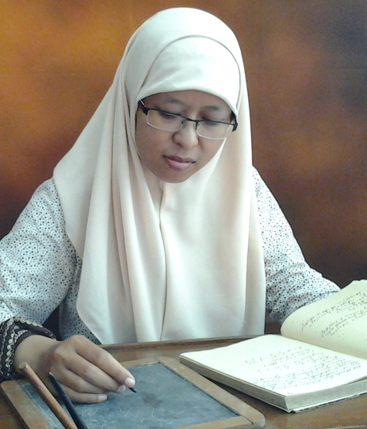 Pemeragaan penggunaan alat tulis tradisional sabak di Museum Pendidikan Indonesia, Universitas Negeri Yogyakarta.